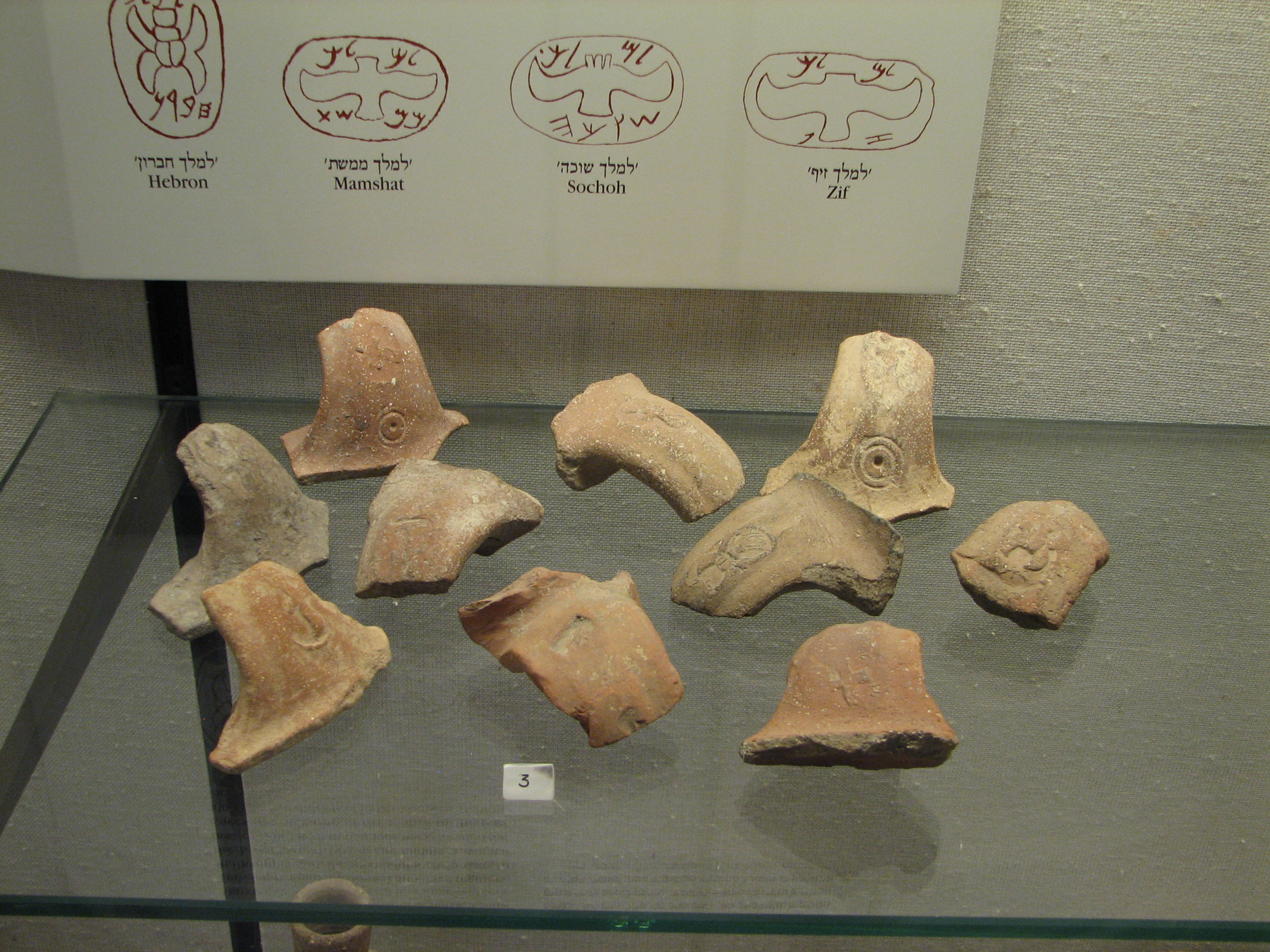 LMLK seals were stamped on the handles of large storage jars mostly in and around Jerusalem during the reign of King Hezekiah (circa 700 BC) in Hecht Museum, Israel חותמות לַמֶּלֶךְ הוא כינוי שניתן לידיות קנקני אגירה שבהן הוטבעה הכתובת "למלך" בעזרת חותמות. ההטבעה נמצאה על מספר גדול של קנקני אגירה (כ-2,000 קנקנים) שנמצאו באזור יהודה, ובמיוחד סביב ירושלים, והמתוארכים לדעת רוב החוקרים לתקופת מלכותו של חזקיהו מלך יהודה שמלך במאה ה-8 ותחילת המאה ה-7 לפנה"ס במוזיאון הכט באוניברסיטת חיפה